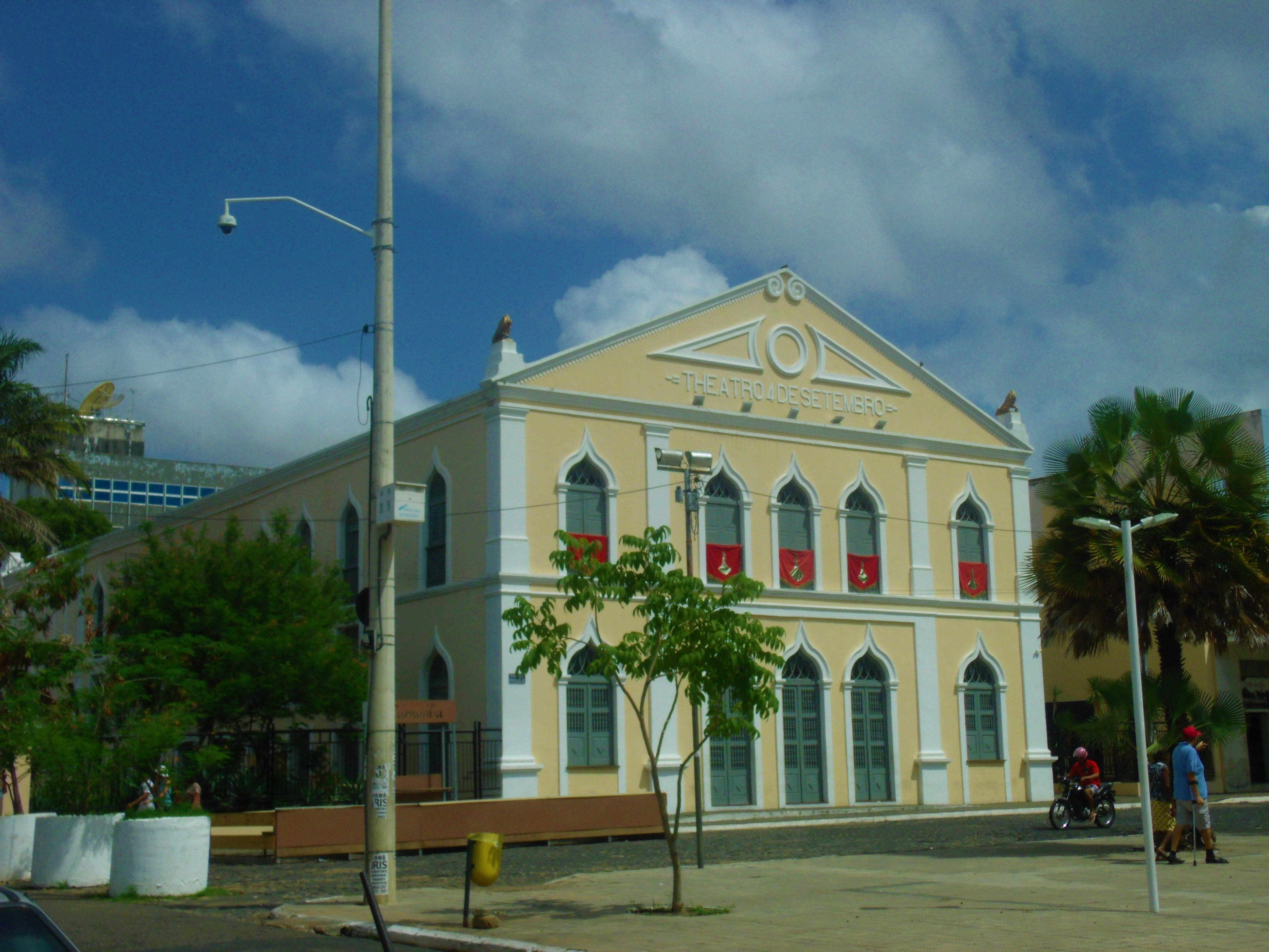 Teatro Quatro de Setembro em janeiro de 2020.